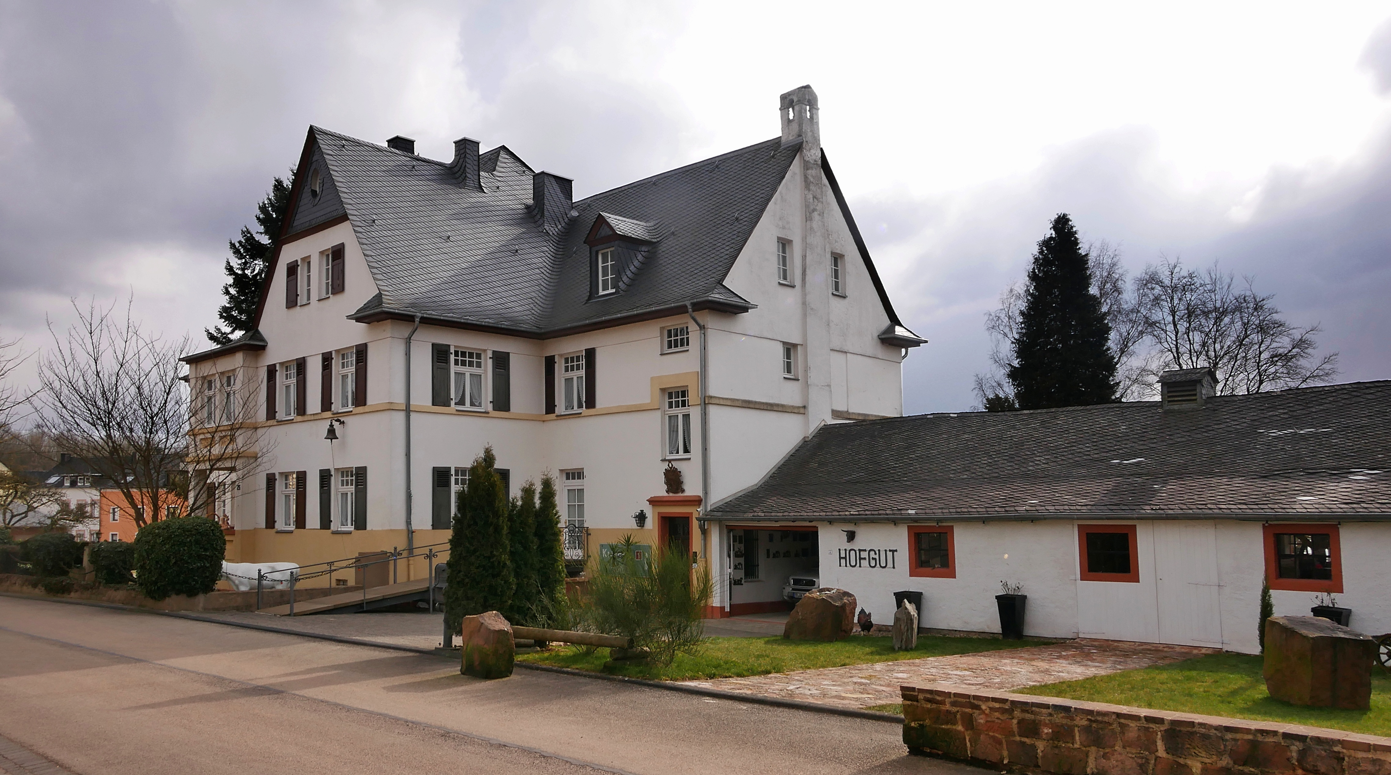 Haus Krockow, ehemaliges Verwalterhaus von Schloss Kesselstadt. 1925 erbaut und auch innen nahezu original erhalten.